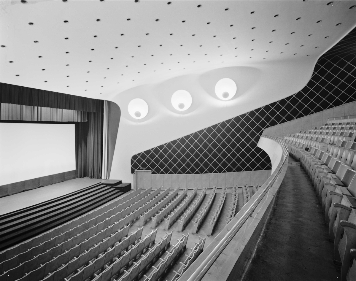 Sentrum kino, salen